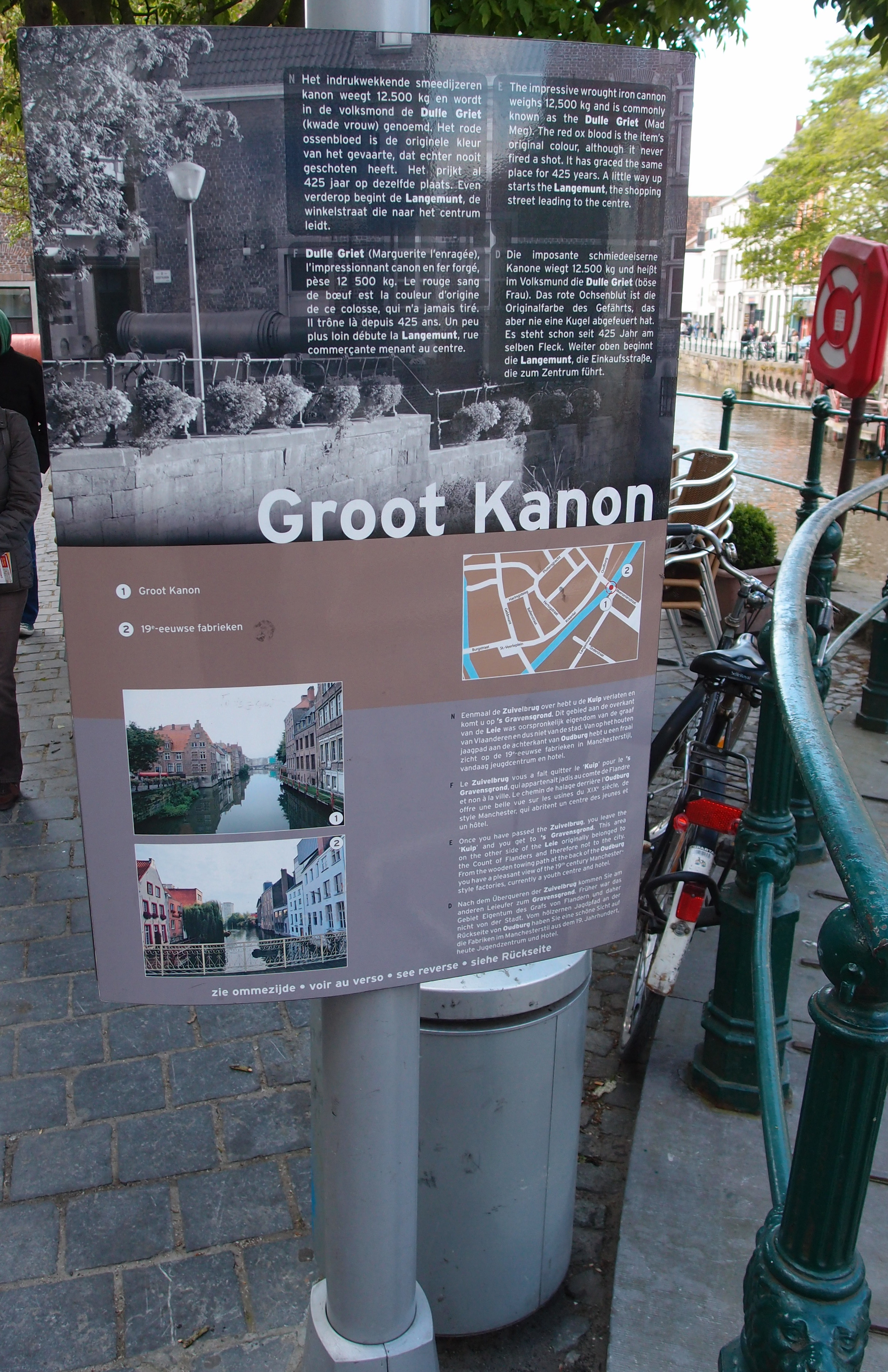 Öffentliche Hinweistafel in Gent zur Kanone "Dulle Griet" Datum: 19.04.2014 Urheber: M. Pfeiffer alias Gordito1869 Quelle privates Fotoarchiv des Urhebers